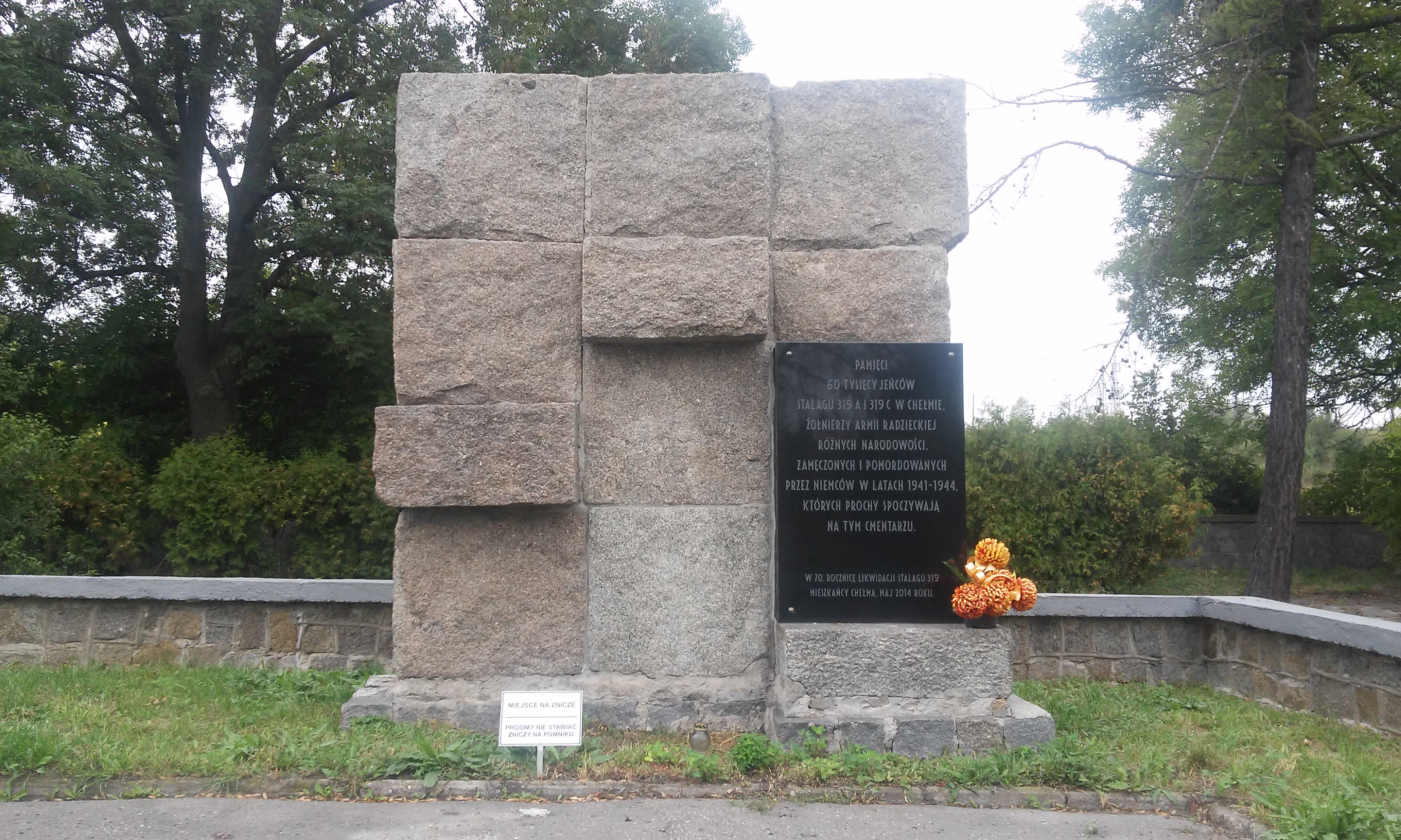 Pomnik ofiar stalagu 319 w Chełmie